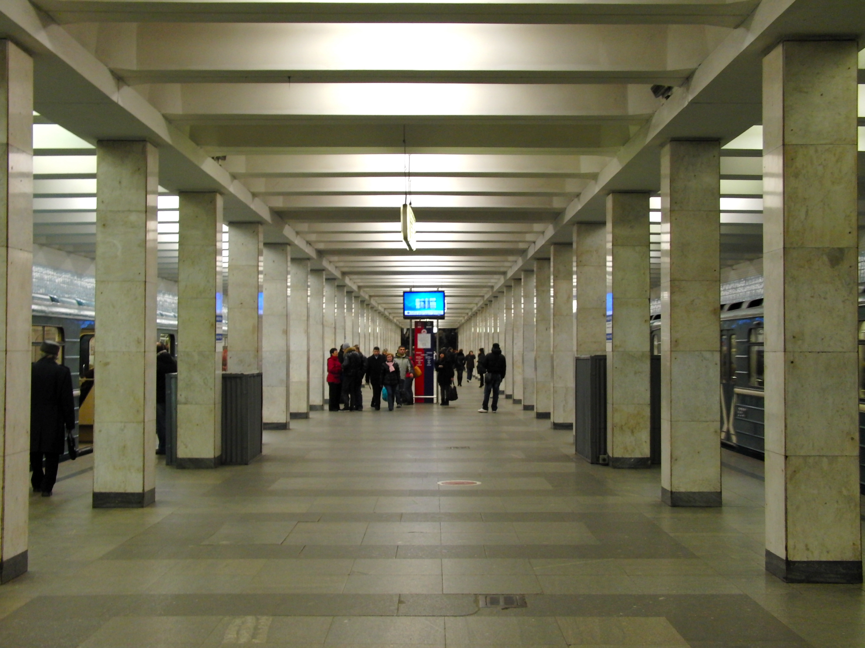 Voykovskaya (Войковская)